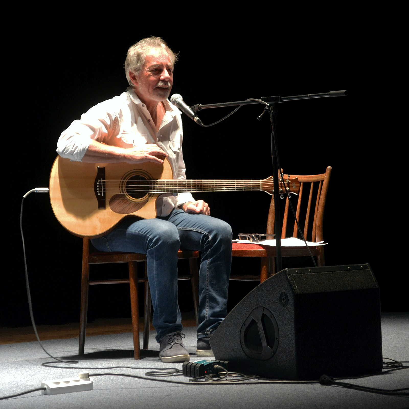 Ivo Jahelka během koncertu v Brně na Musilce ve středu 17. října 2018